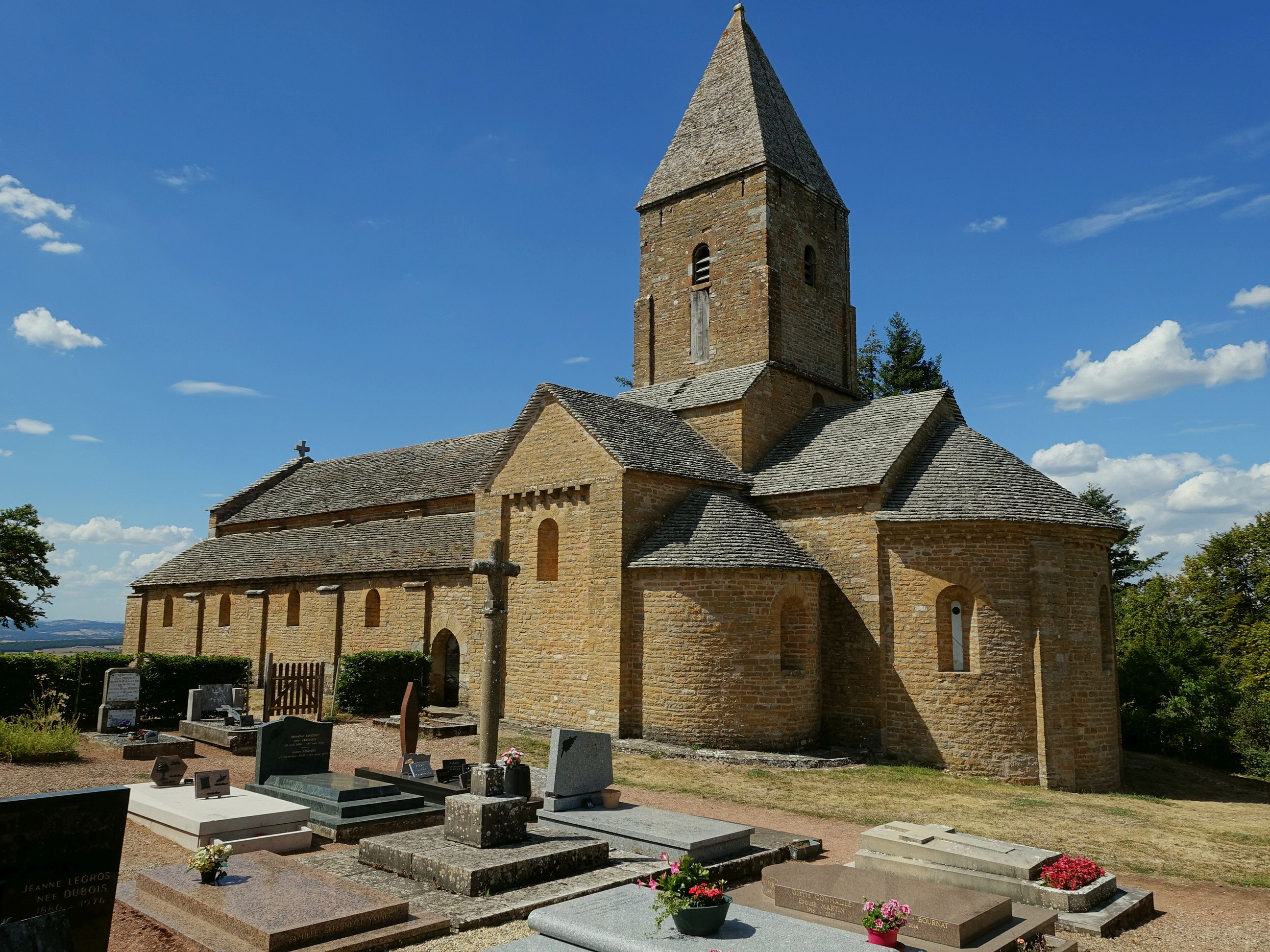 Romanische Kirche Saint-Pierre in Brancion, Burgund